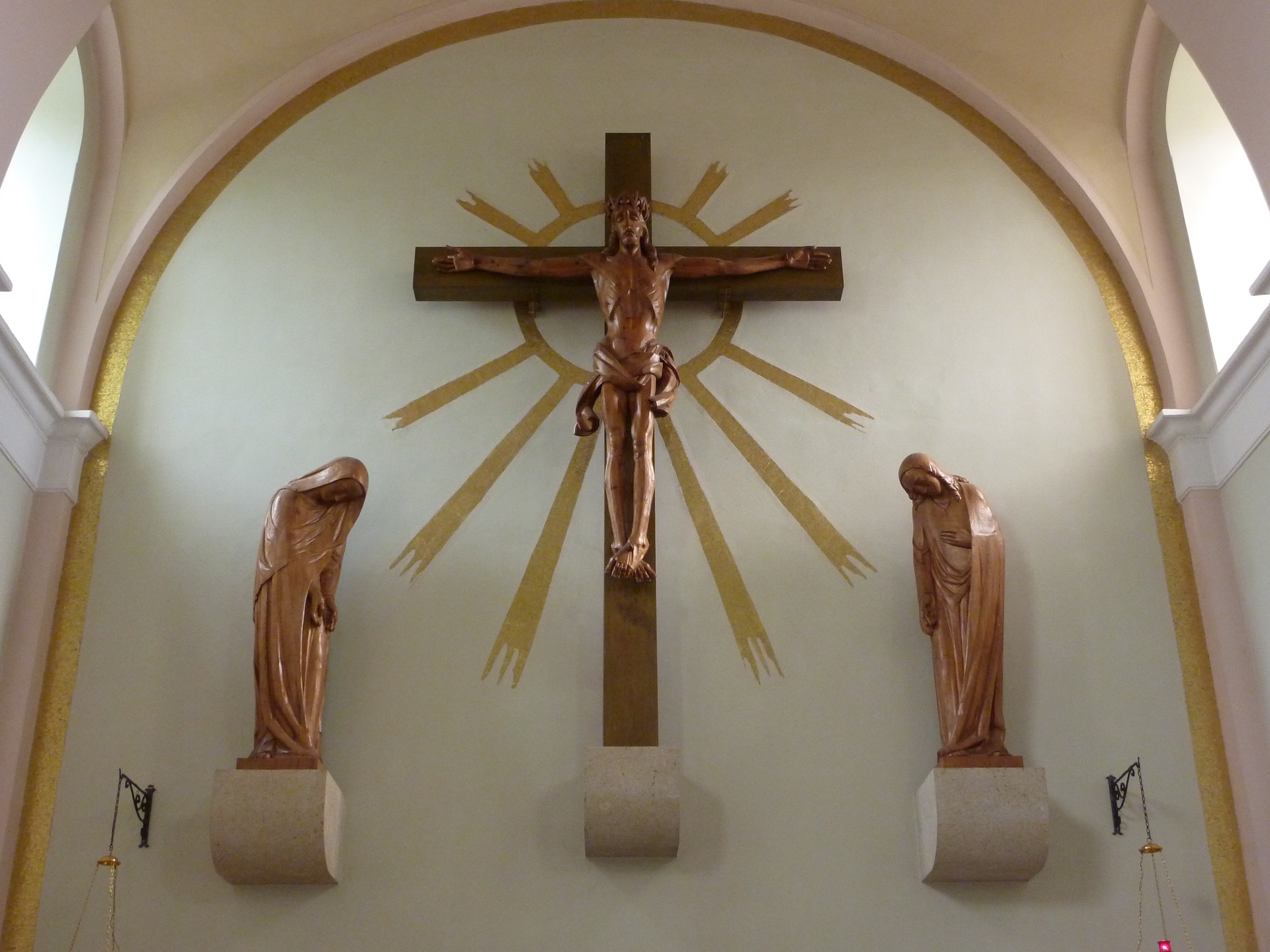 Pfarrkirche hl. Florian, Hanfthal, Laa an der Thaya, Niederösterreich - Kruzifix und Statuen hll. Maria und Johannes Ev., Sepp Kals, 1960